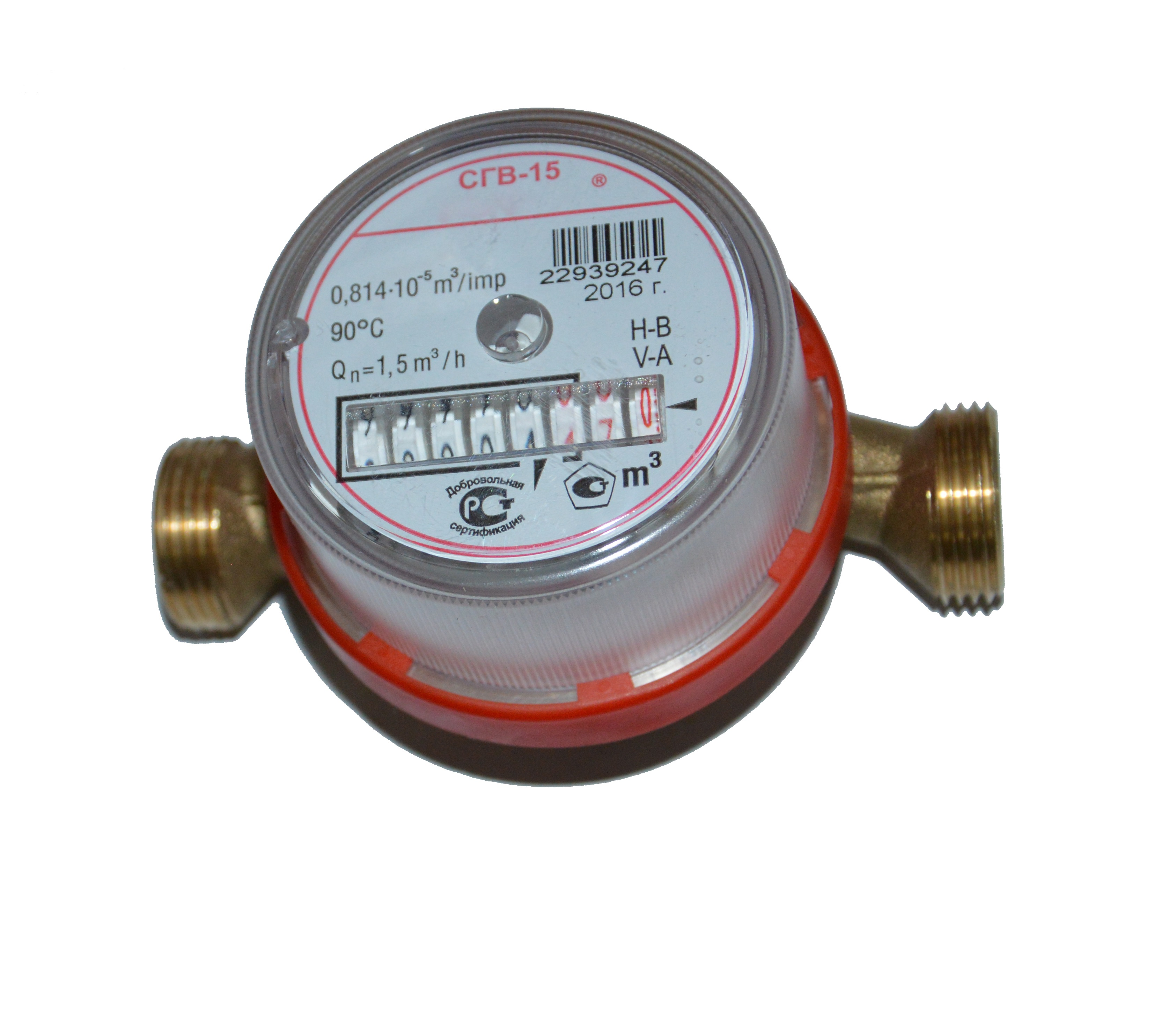 Счётчик горячей и холодной воды. Внешний вид.